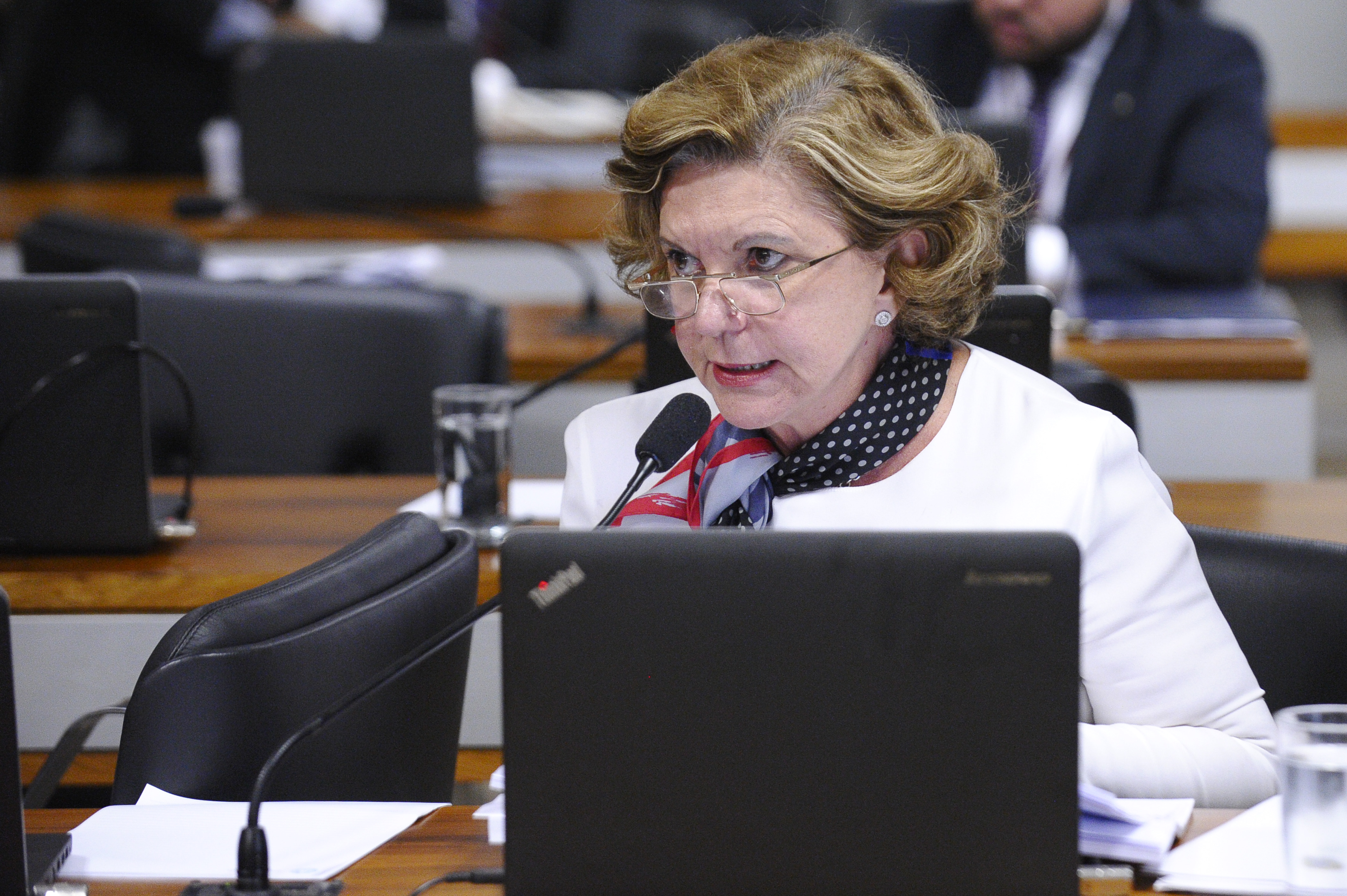 Comissão de Assuntos Econômicos (CAE) realiza reunião deliberativa com 16 itens. Na pauta, Emenda de Plenário ao PRS 84/2007, que dispõe sobre o limite global para o montante da dívida consolidada da União; e PLS 280/2013, que destina recursos do fundo social para a educação básica e a saúde infantil. Em pronuciamento, senadora Lúcia Vânia (PSDB-GO) Foto: Edilson Rodrigues/Agência Senado